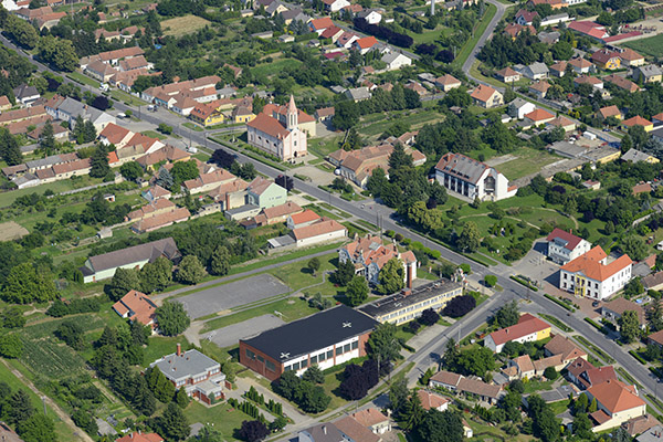 Beled város a magasból